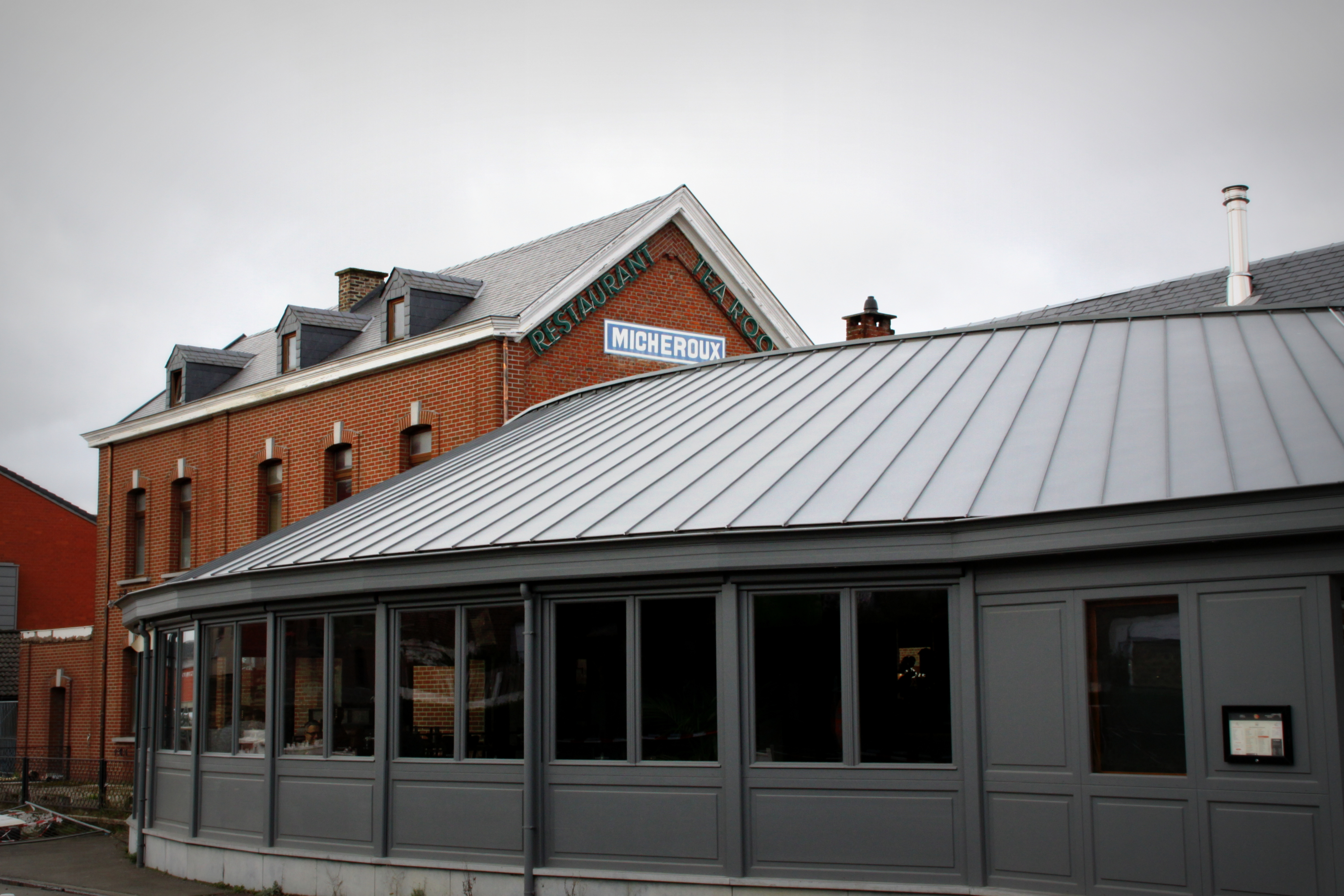 Gare vu Micheroux (2020)